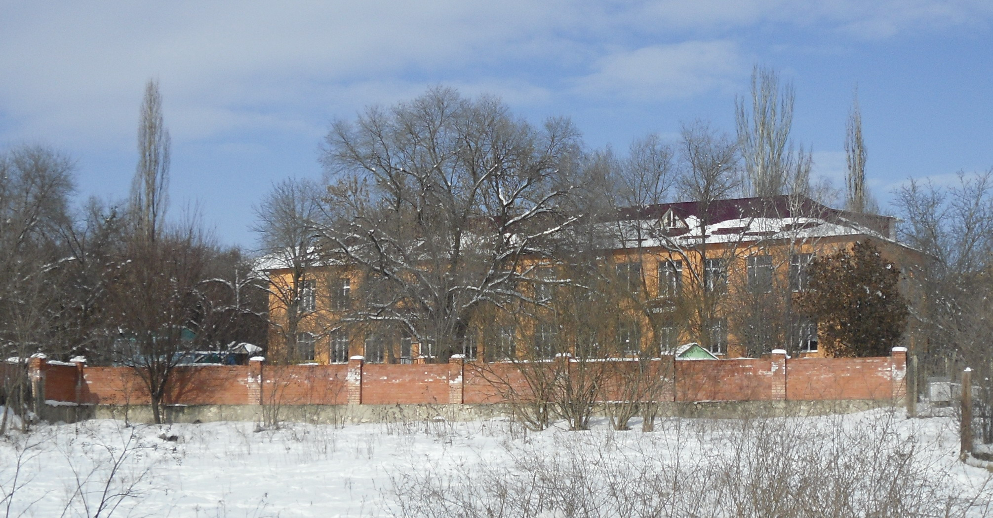 Детсад "Ласточка". 2011 год.